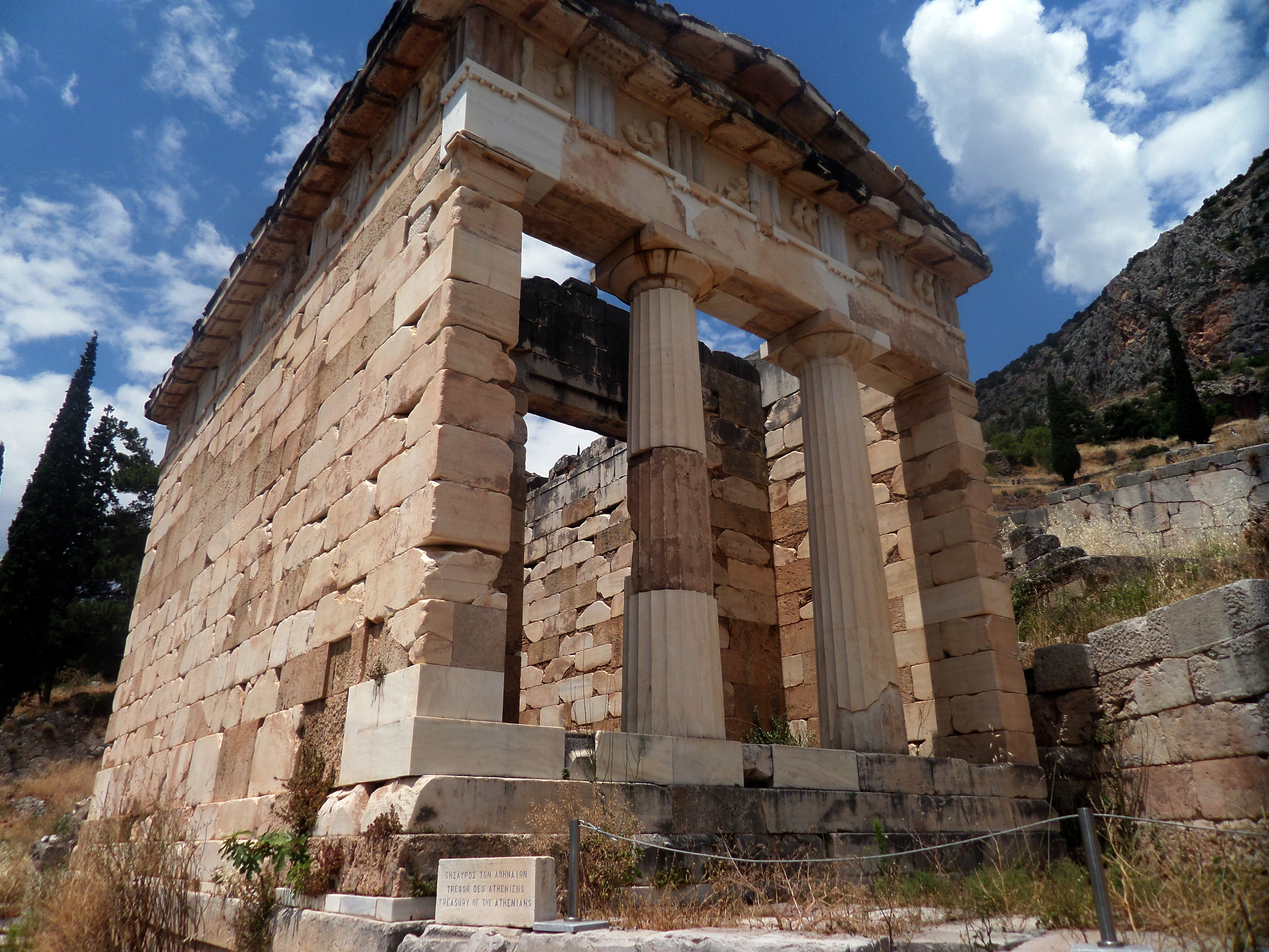 Δελφοί«Δελφοί»